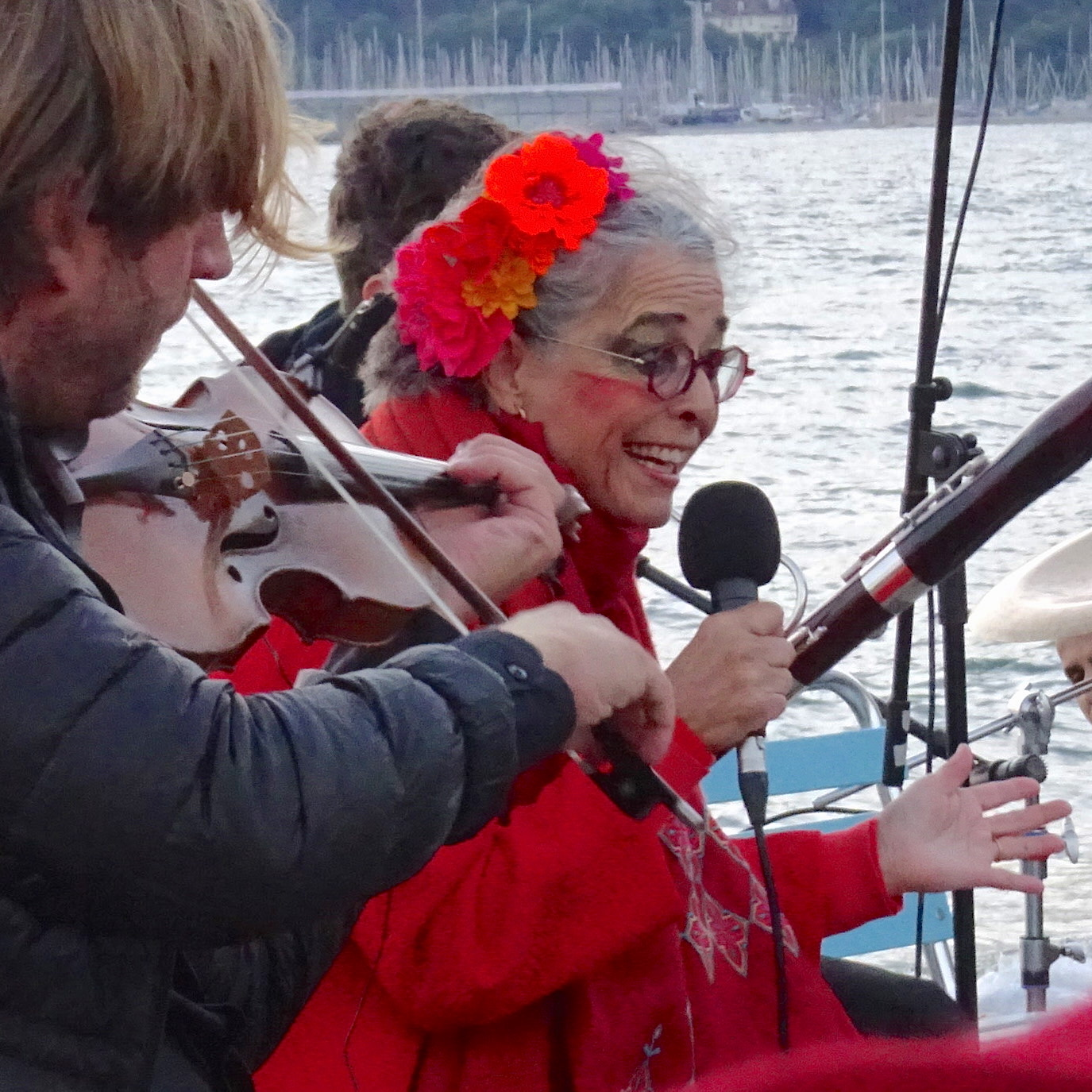 Nabila et l'ensemble Maurice K, "Chants des Balcans" le mercredi 5 août 2020, de 6 à 7 heures sur la jetée des Pâquis. Pierre-Humbert Pottiez au violon.